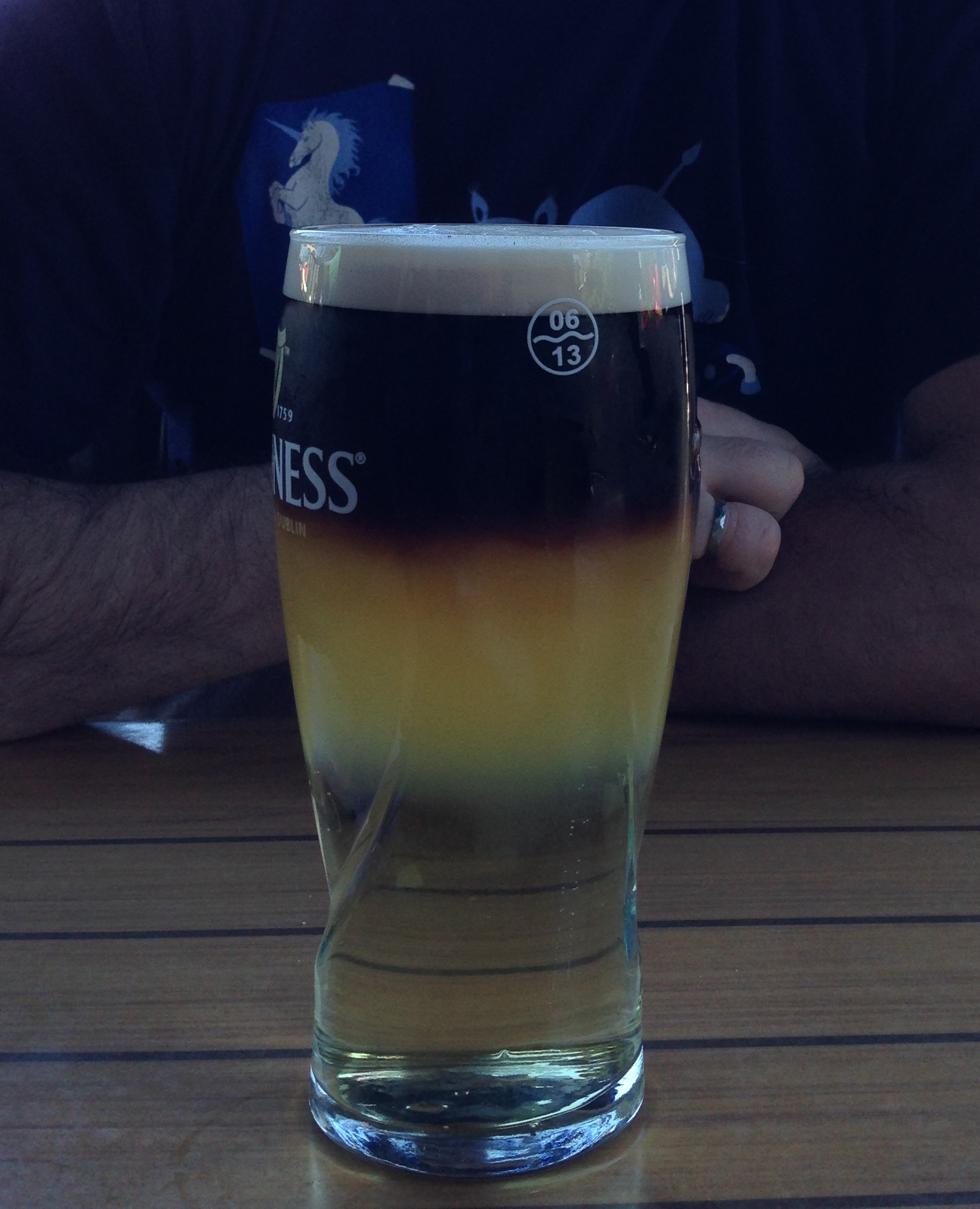 Photographie du cocktail Bien JoJay. Cidre de pomme, bière blanche et Guiness. Inventé au McCarold's Pub à Montréal.